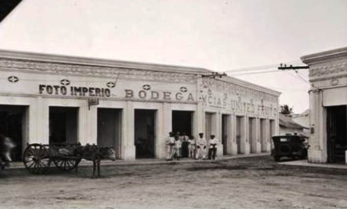 Comisaría de la United Fruit Company en Ciénaga, 1928.